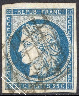 Cérès, premier Émission, 25c. bleu.